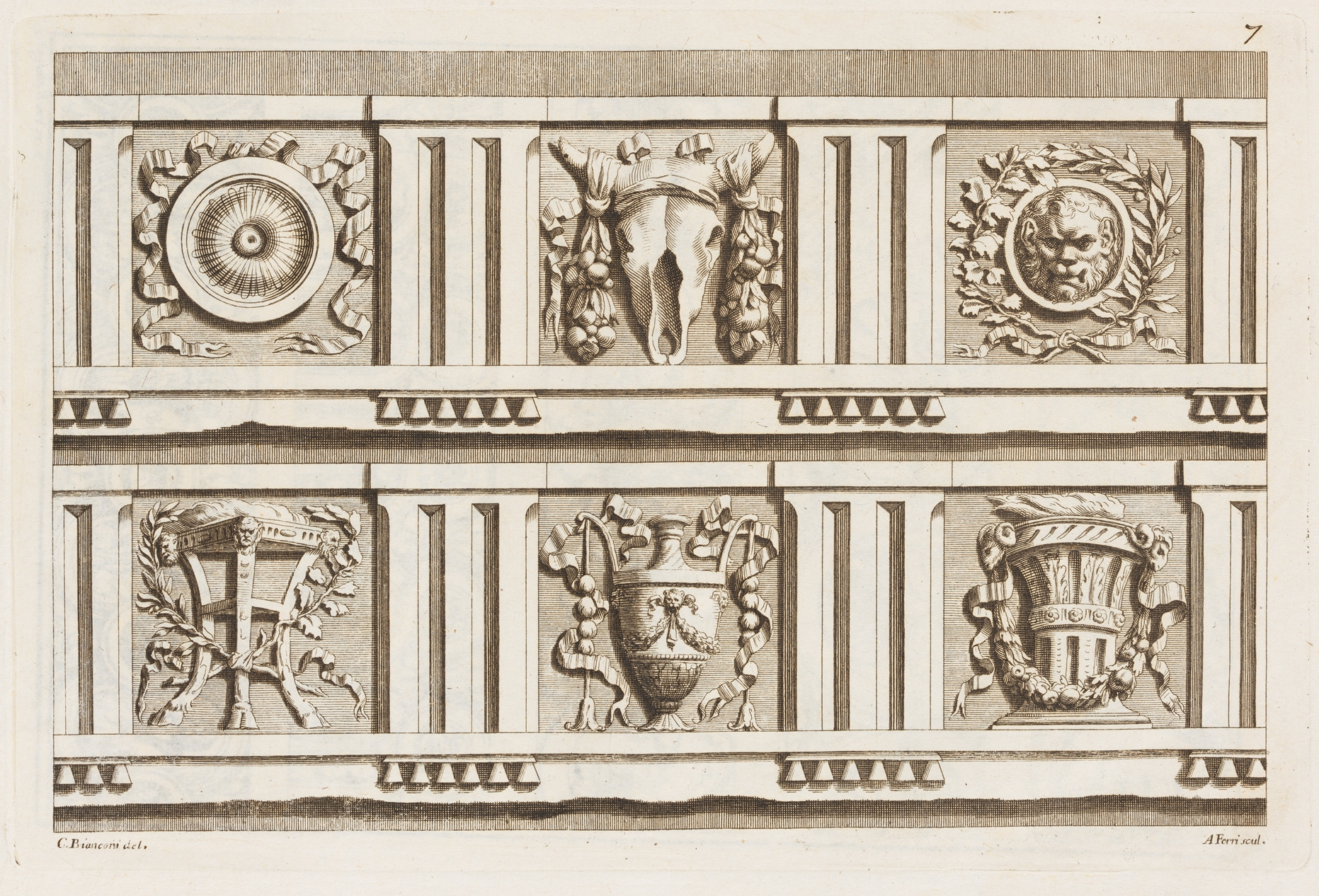 Book; Books